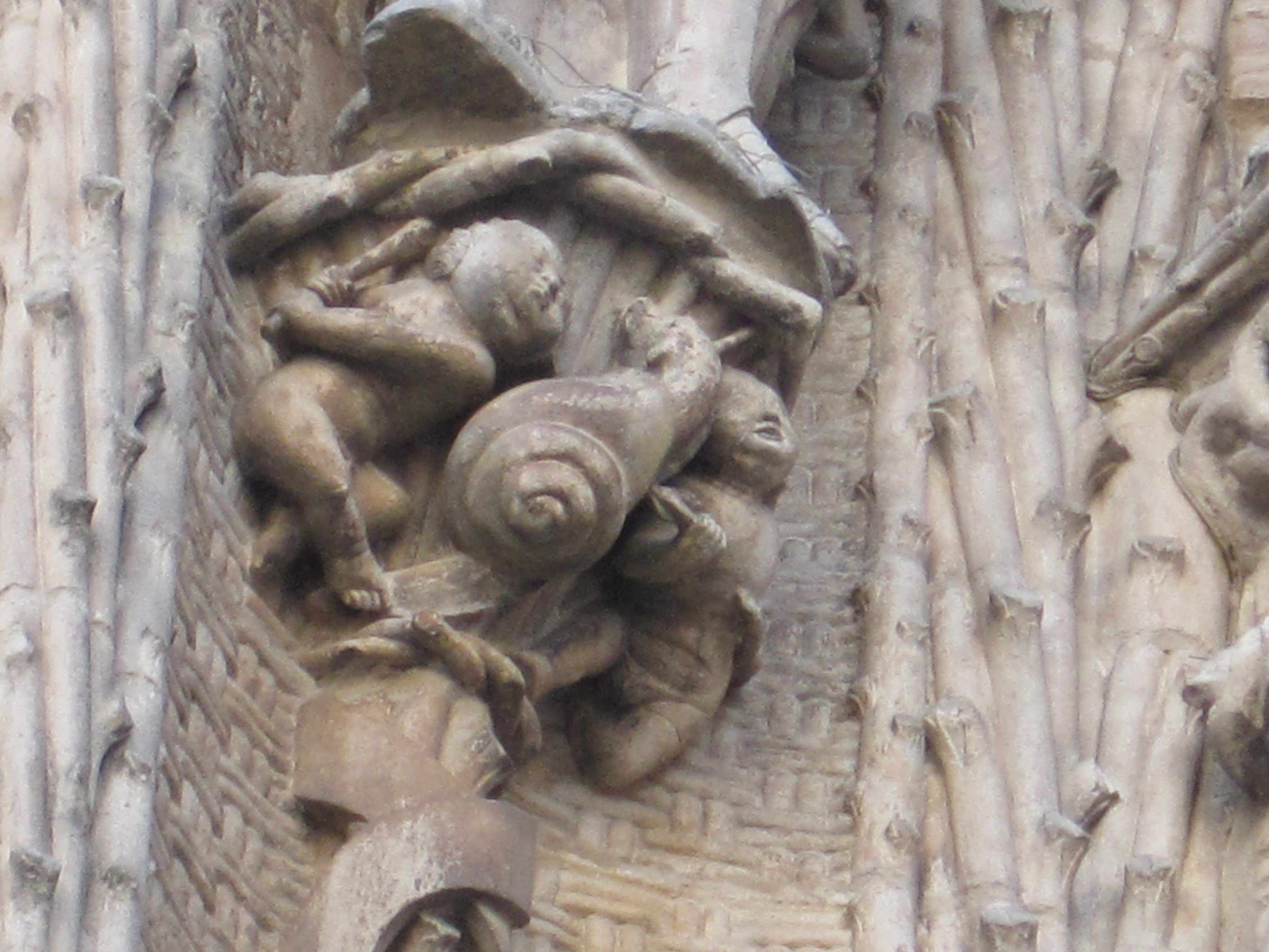 Detalle de la fachada del Colegio de San Gregorio, en Valladolid (España).